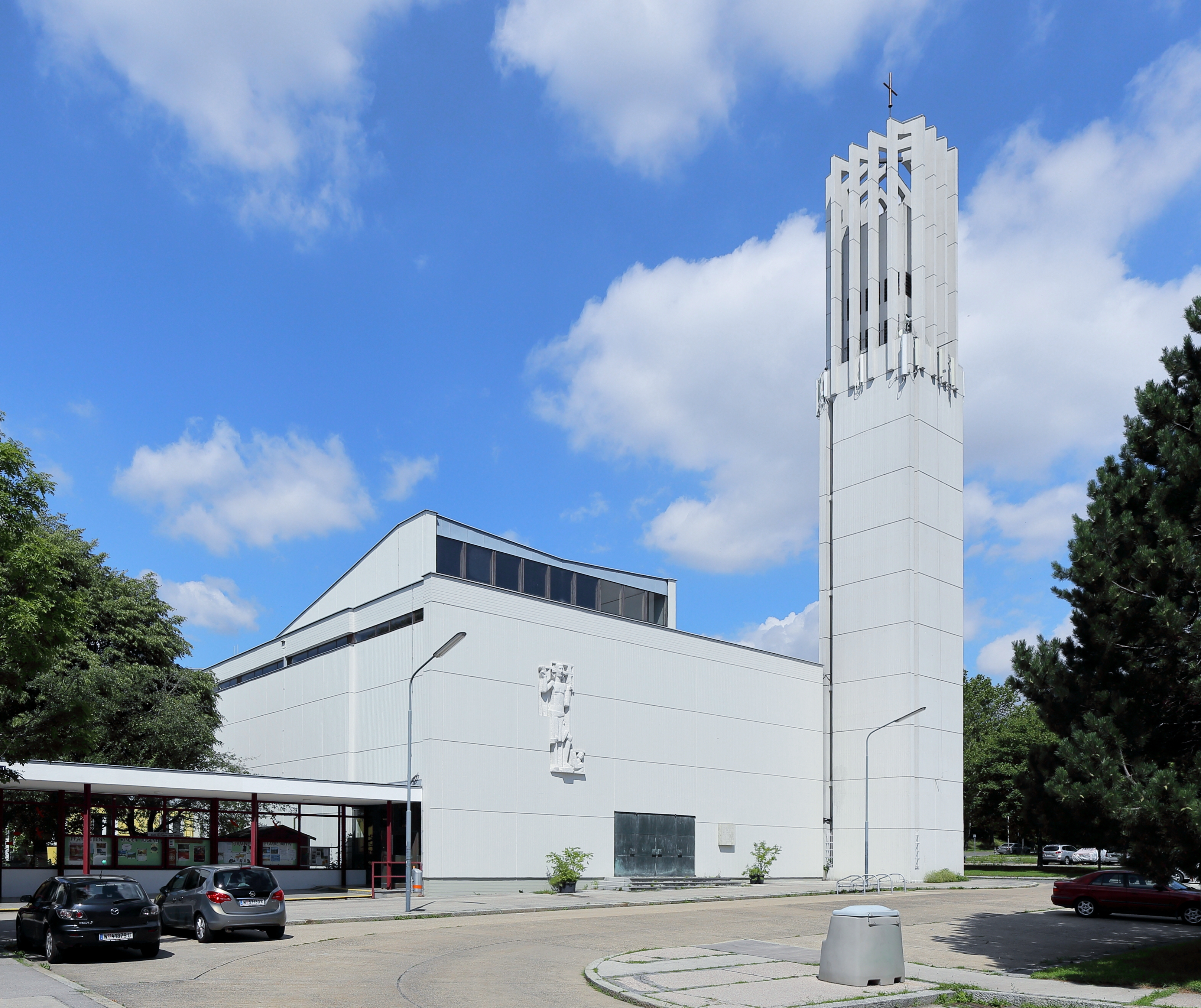 Südostansicht der Pfarrkirche zum heiligen Franz von Sales am Holeyplatz im 10. Wiener Gemeindebezirk Favoriten.Die einschiffige Hallenkirche wurde von 1962 bis 1963 nach Plänen des Architekten Georg Lippert errichtet. Die Kirche hat einen freiliegenden, hängenden Dachstuhl aus Holz und einen Glockenturm, der bis zu der Höhe von 25 m aus schallreinen Betonscheiben besteht und darüber bis auf eine Höhe von 38 m aus einzelnen Stahlbetonrippen, die oben zu einem Korb zusammen führen.